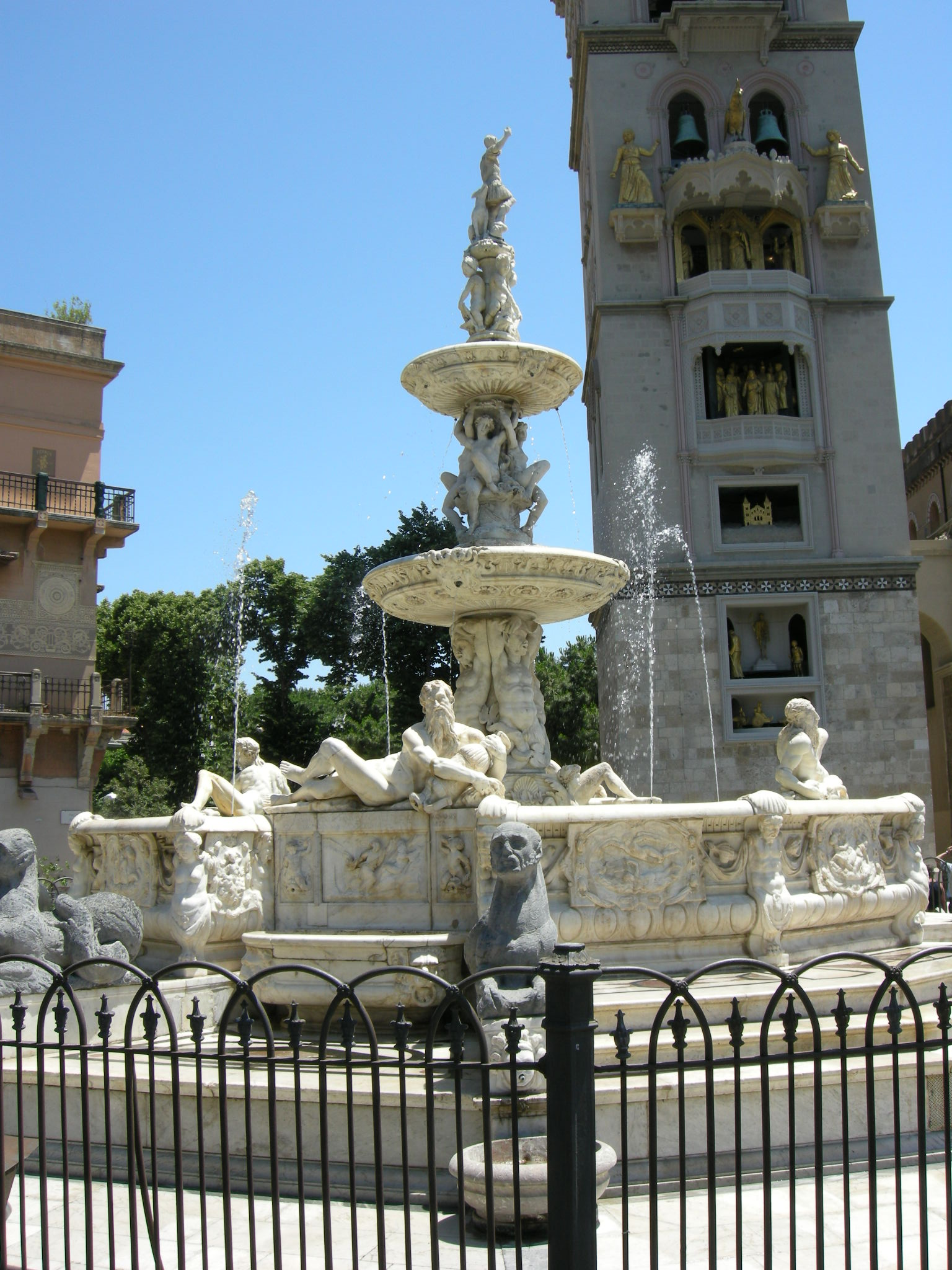 Messina, Fontana di Orione